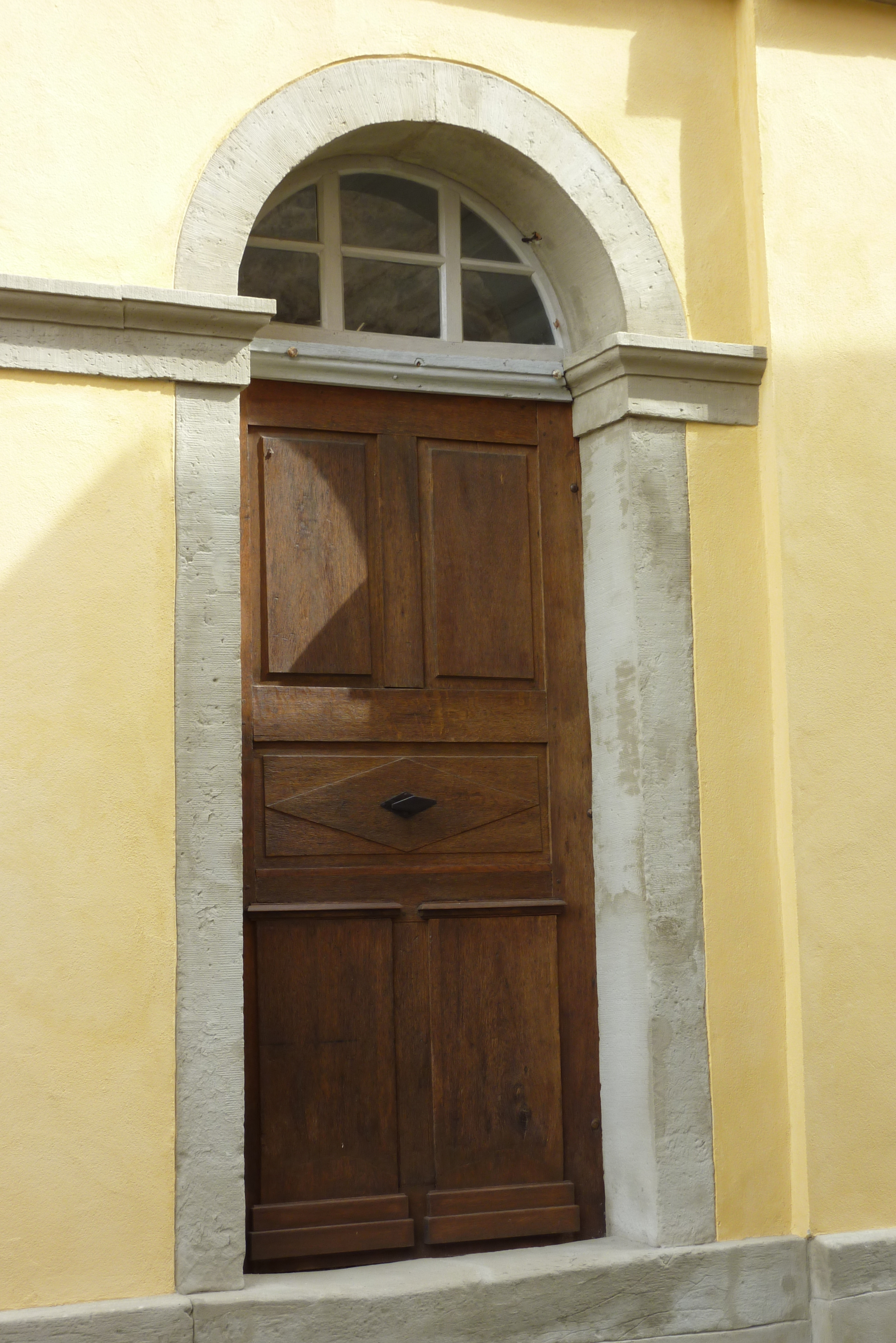 rechter Eingang der profanierten Synagoge in Rohrbach (Sinsheim)